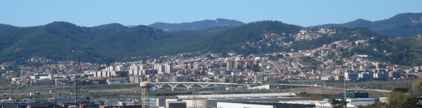 Sant Vicenç dels Horts vist des del parc del Cerdanet, a Sant Feliu de Llobregat